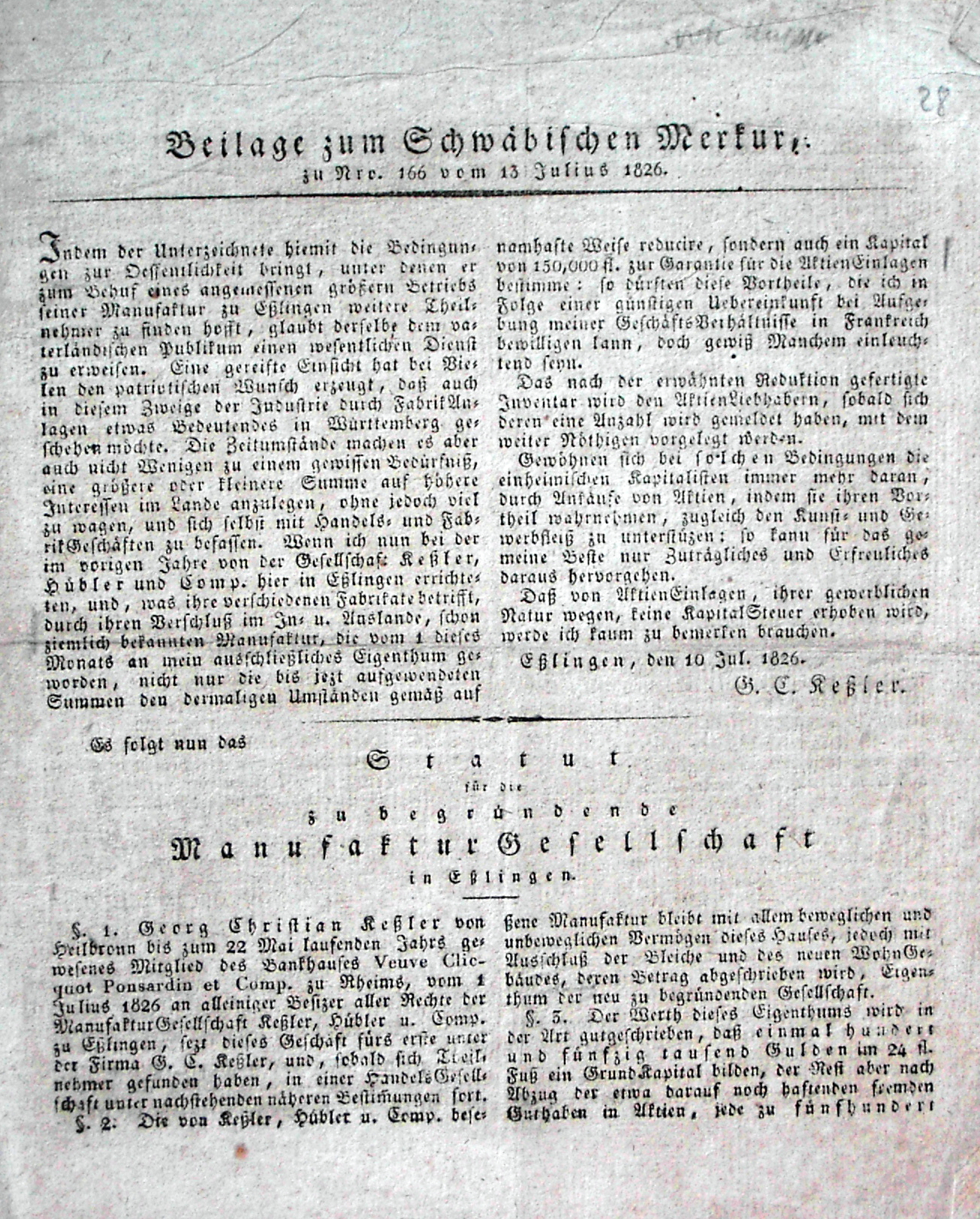 Aufruf Georg Christian von Kesslers, Aktionär seiner Textilaktiengesellschaft zu werden; Beilage zur Schwäbischen Chronik vom 13. Juli 1826